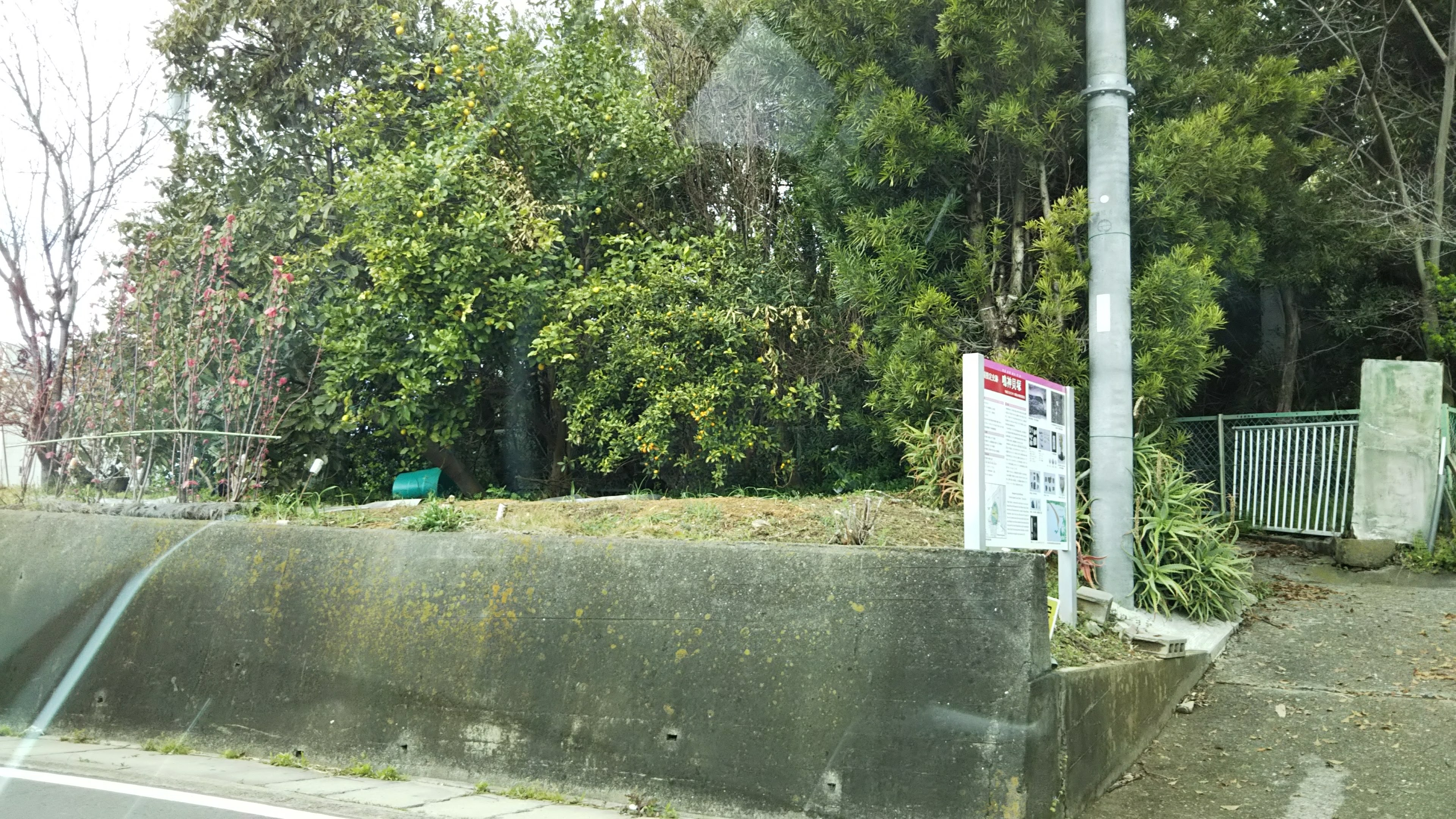 Narukami shell mount